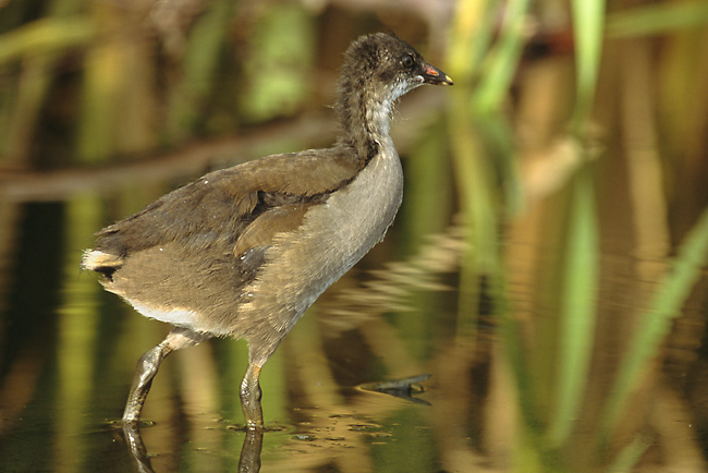 Gallinula chloropus, young